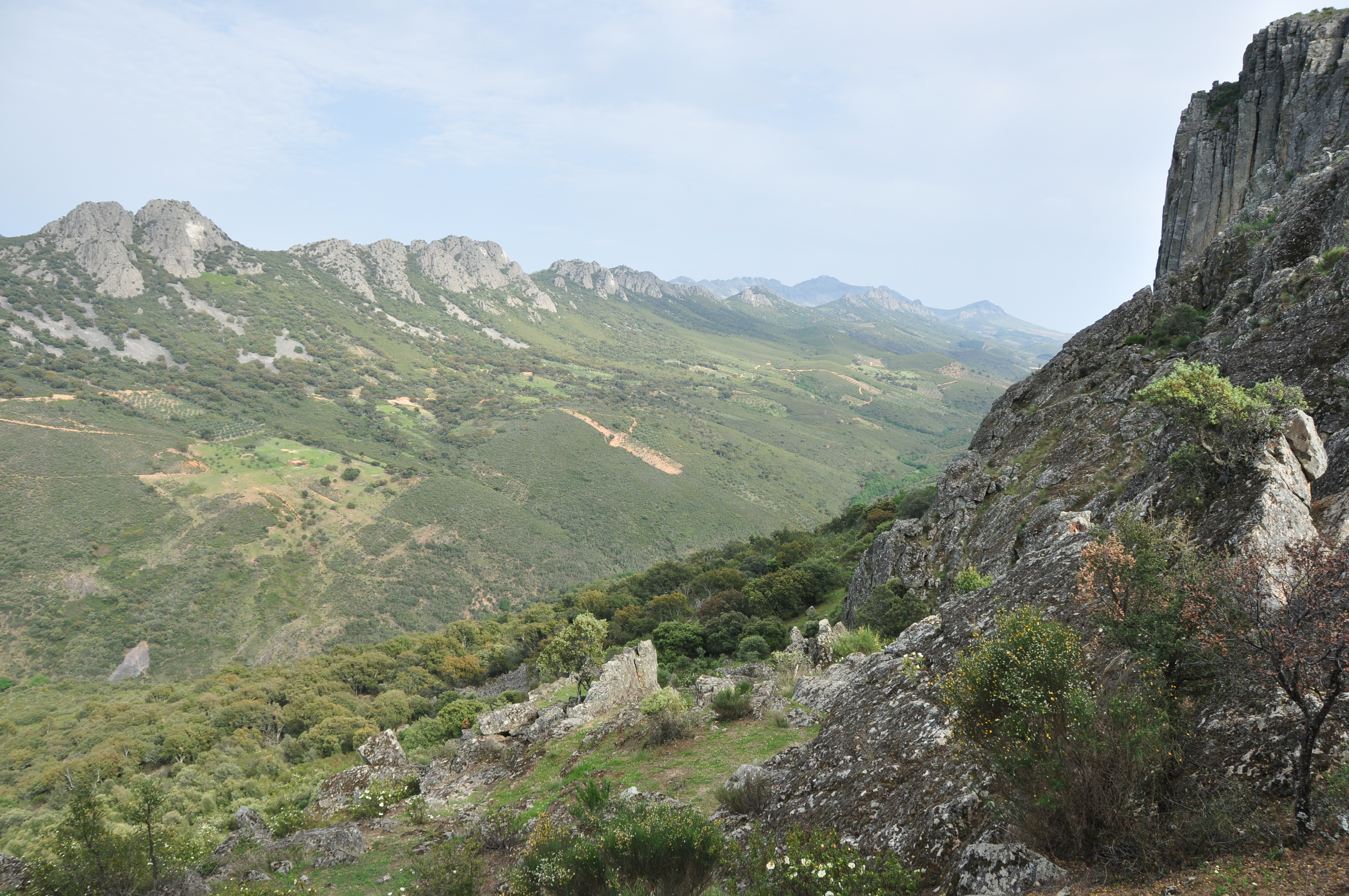 Sierra de las Villuercas y Valle del Guadarranque This is a photography of a Special Area of Conservation in Spain with the ID: ES4320039. Natura2000 entry, EEA entry